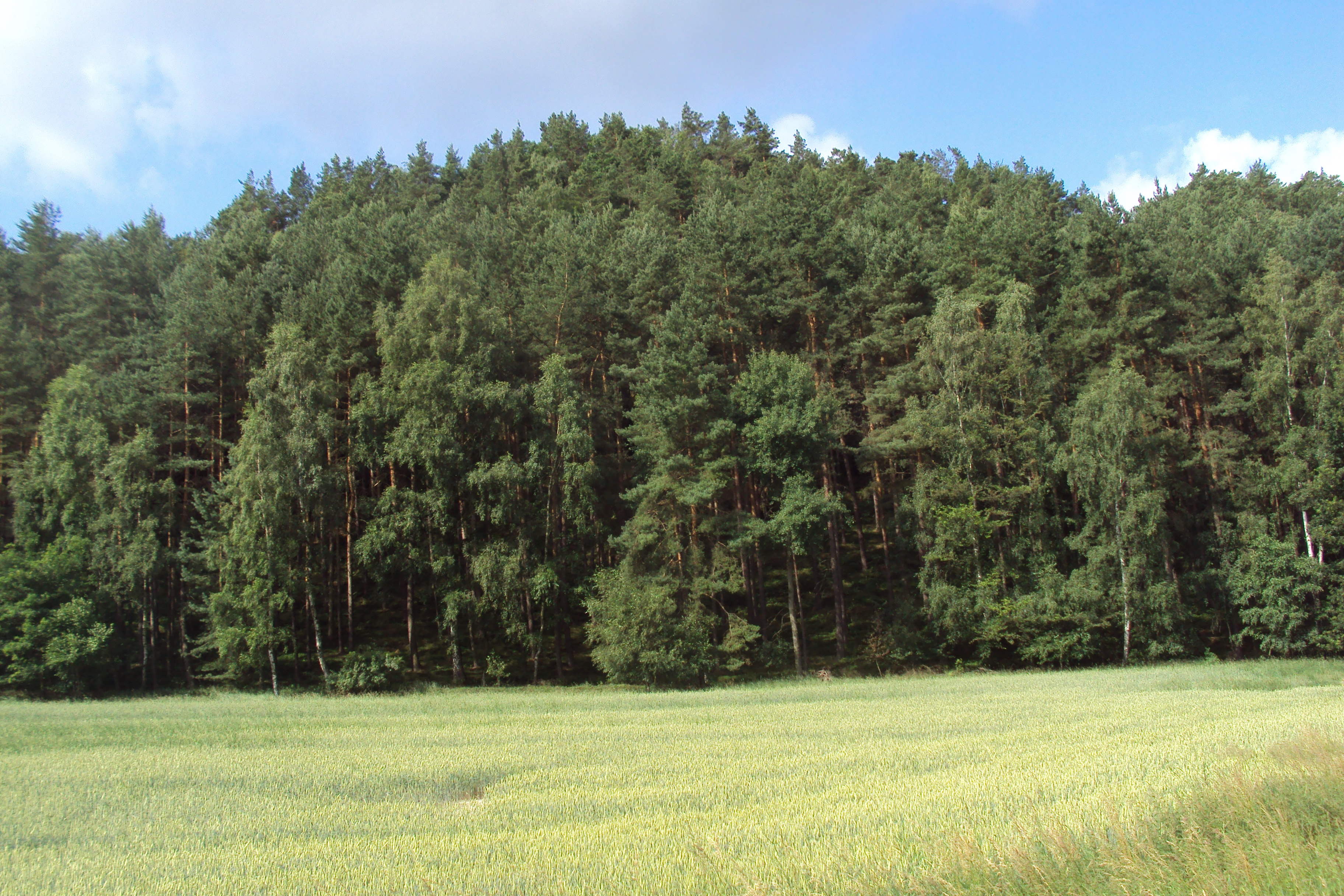 Kopec i přírodní památka od rozcestníku Vlhošťského dolu